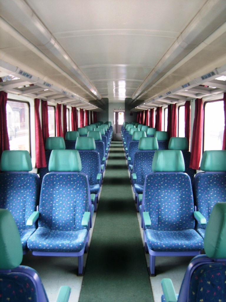 IC/EC car inside / MÁV Bpmz típusú IC/EC kocsi